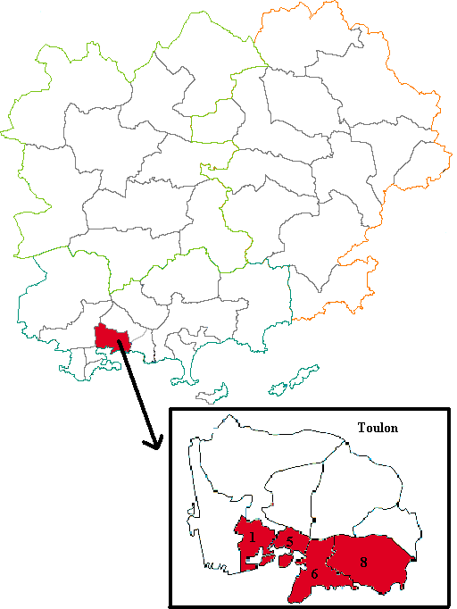 Première circonscription législative du département du Var (France